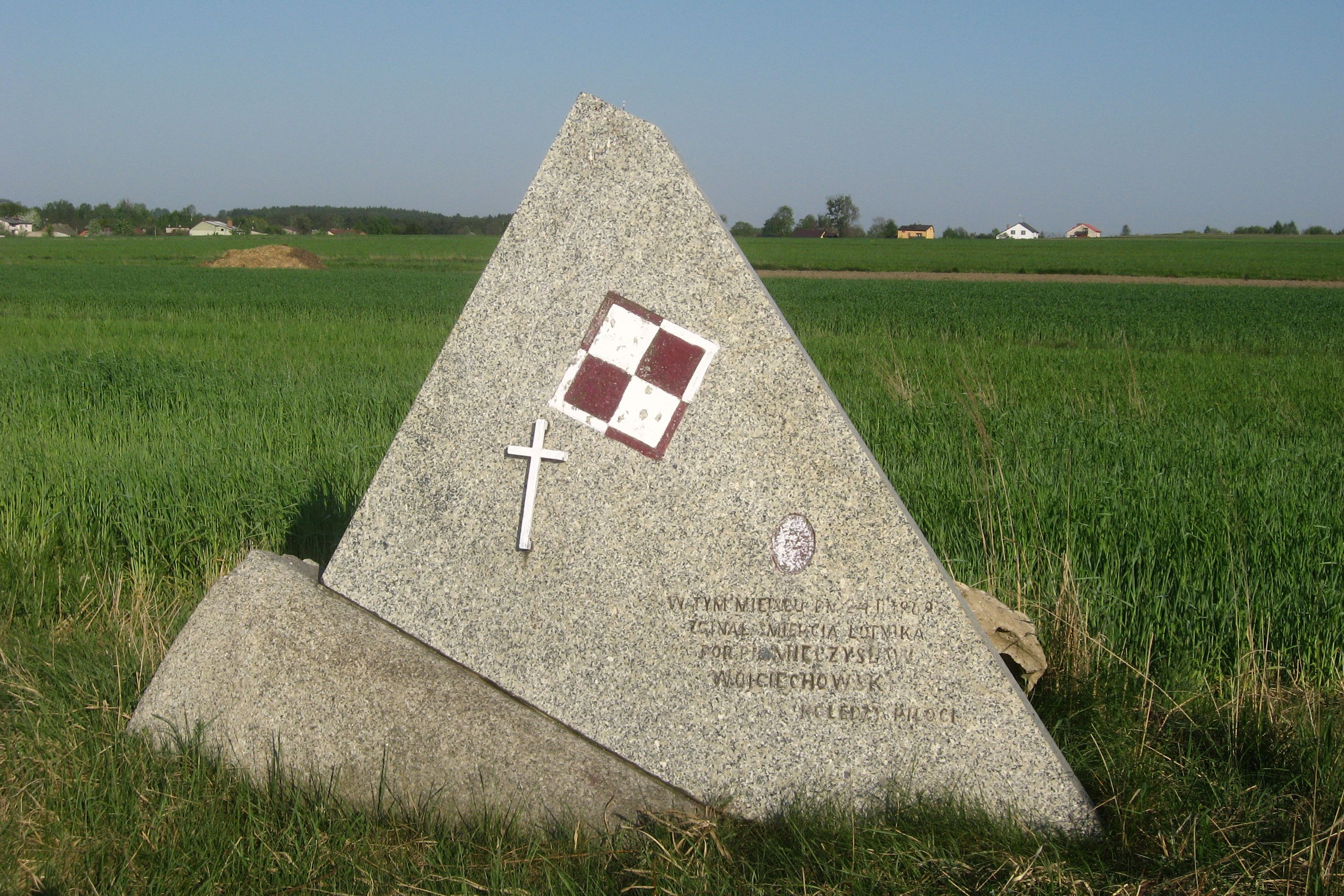 Pomnik lotnika na polach kolo Zamłynia